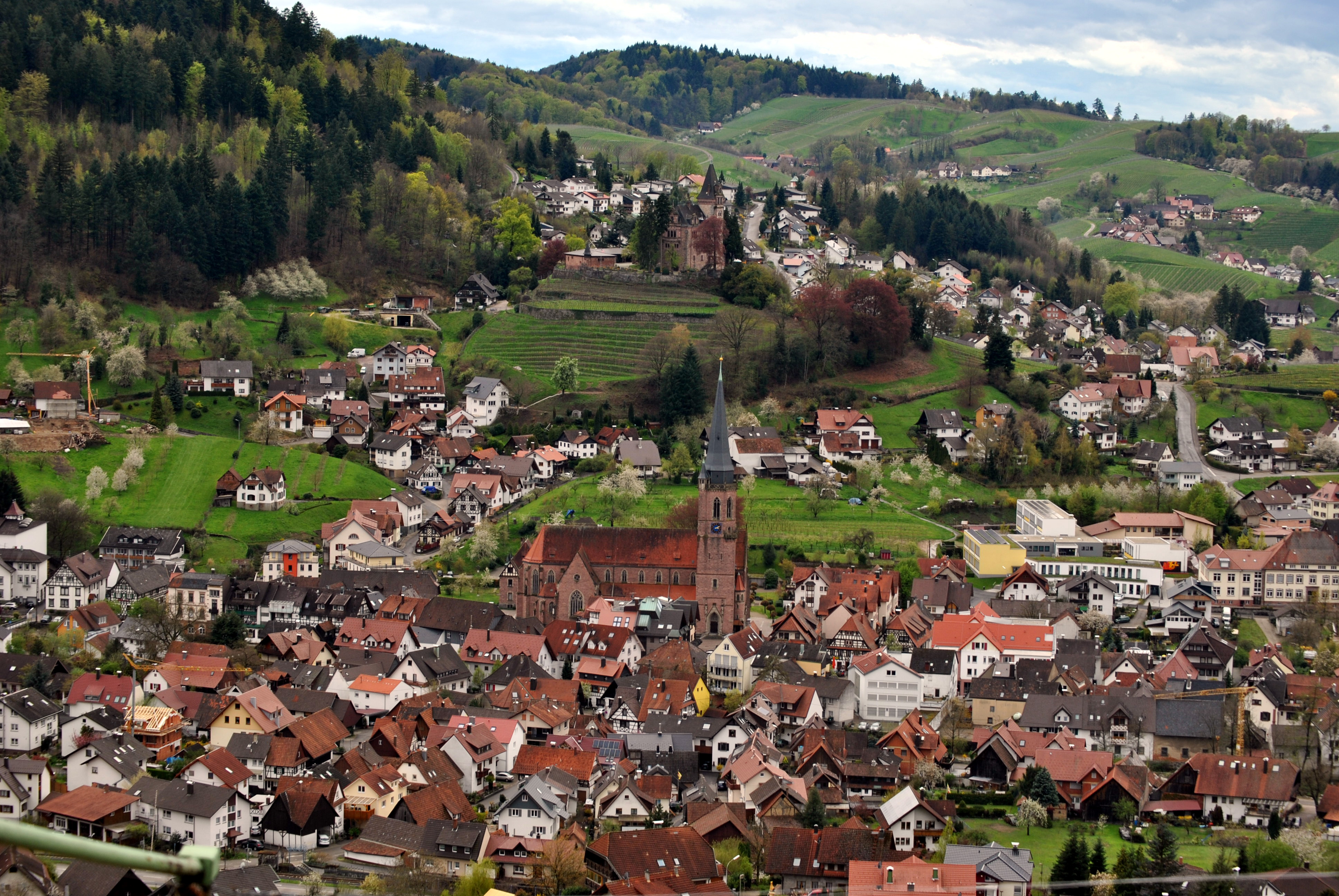 Der idyllische Luftkurort Kappelrodeck im Schwarzwald